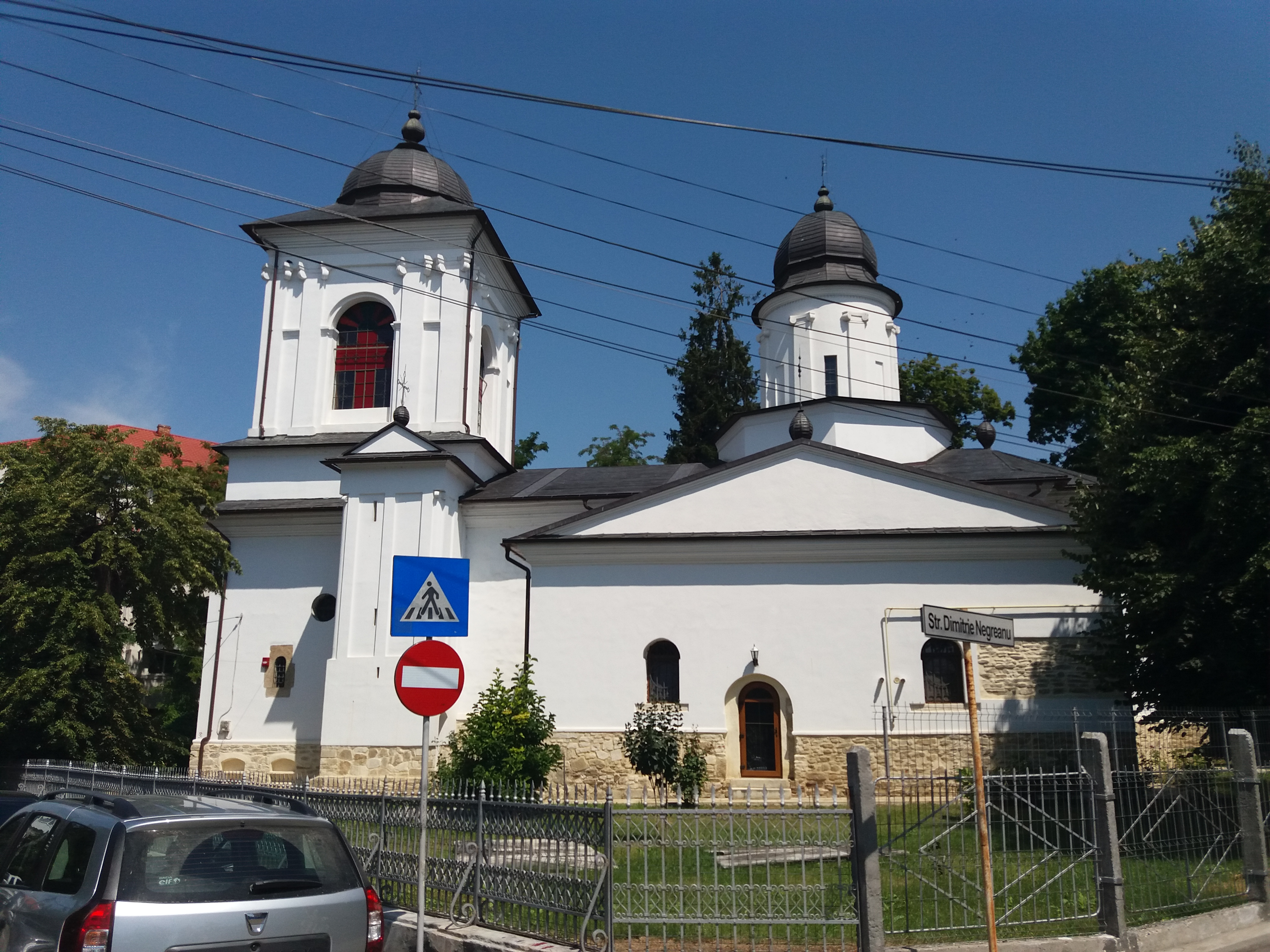 Biserica „Sfânta Maria” este o biserică armeană din Botoșani.